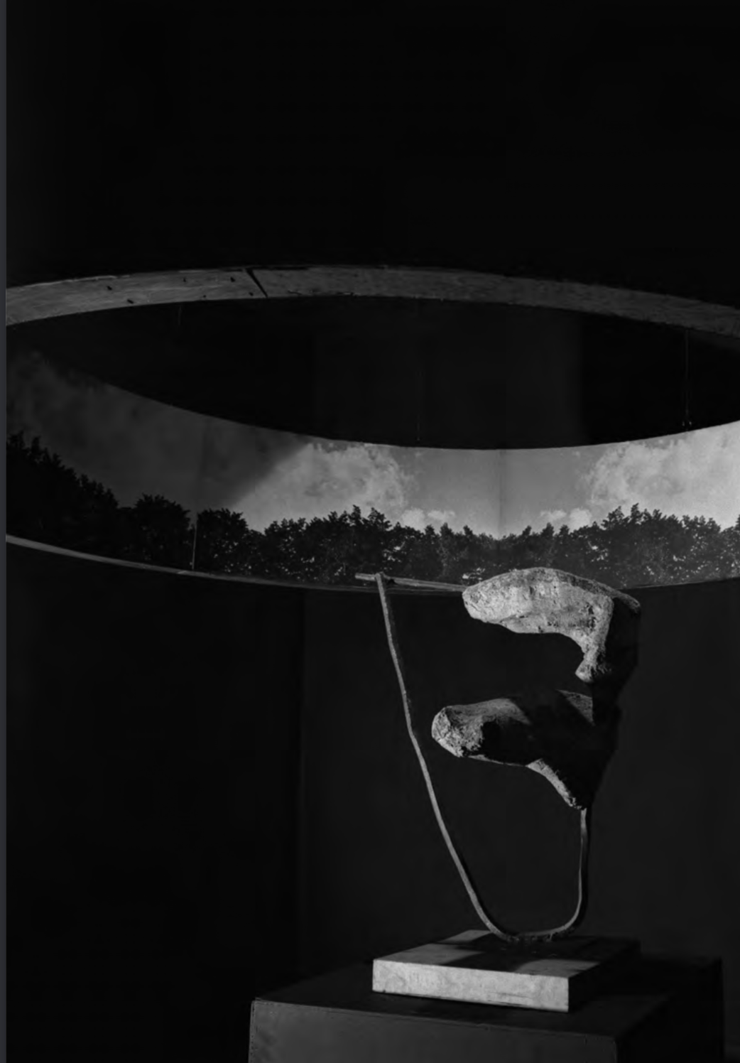 Magdalena Więcek, Florale, 1959, instalacja, cement, metal, fotografia, drewno, wymiary instalacji nieznane, wymiary formy rzeźbiarskiej 85 x 65 x 45 cm